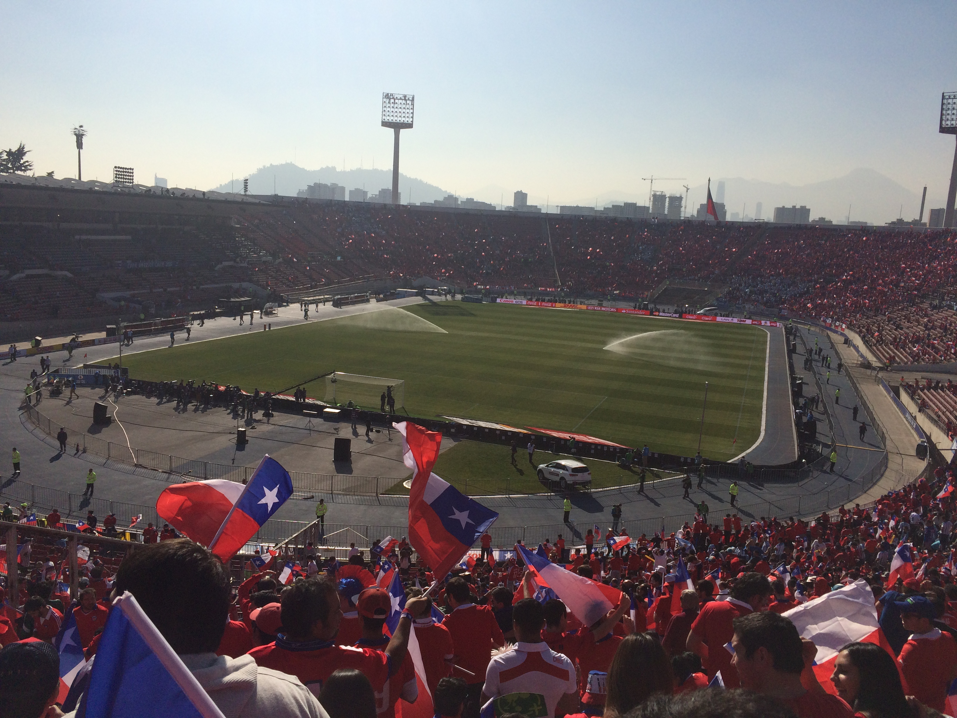 4 de Julio de 2015 Chile vs. Argentina 0 (4) - 0 (1)